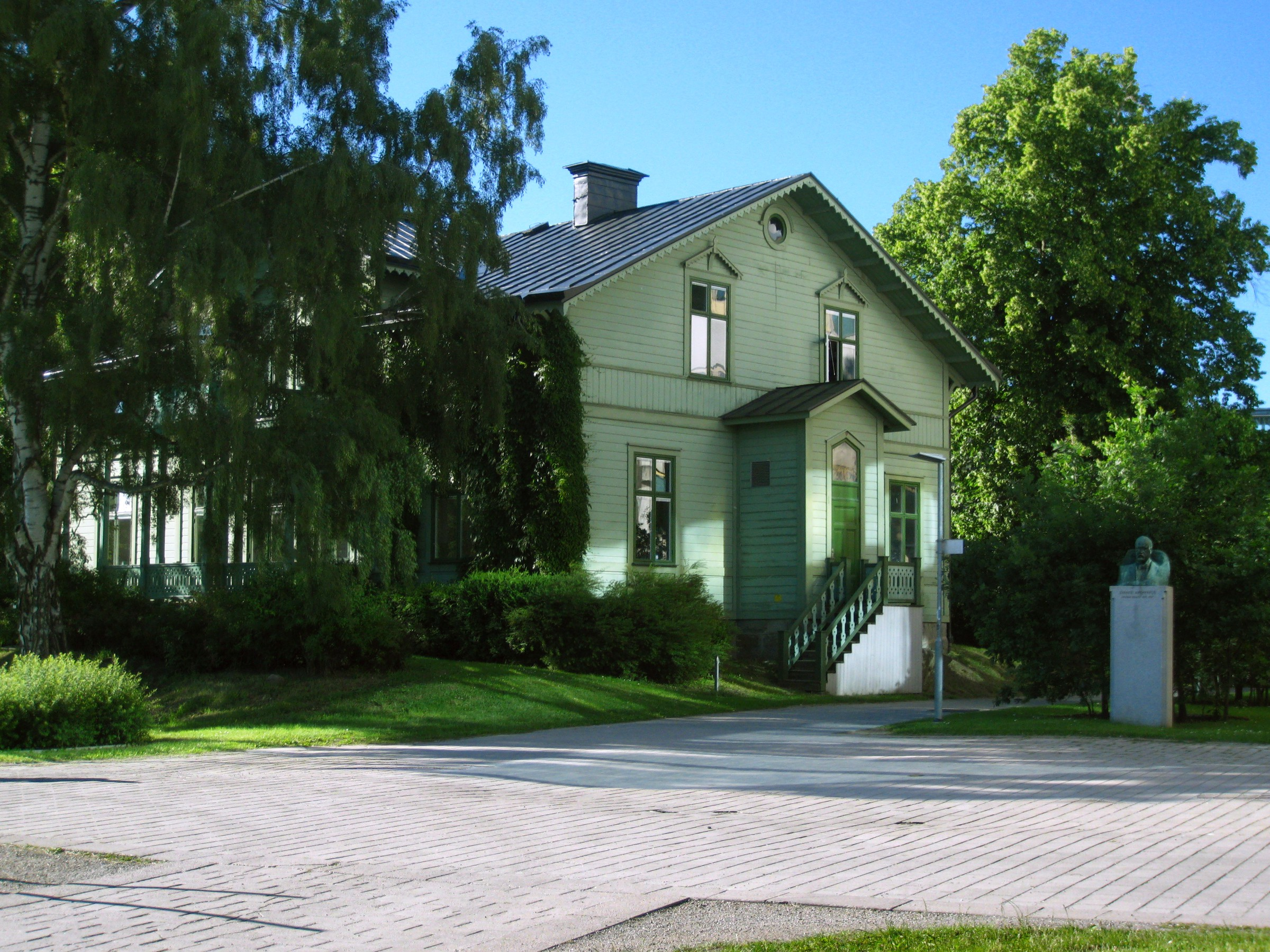 Gröna villan vid Stockholms universitet.